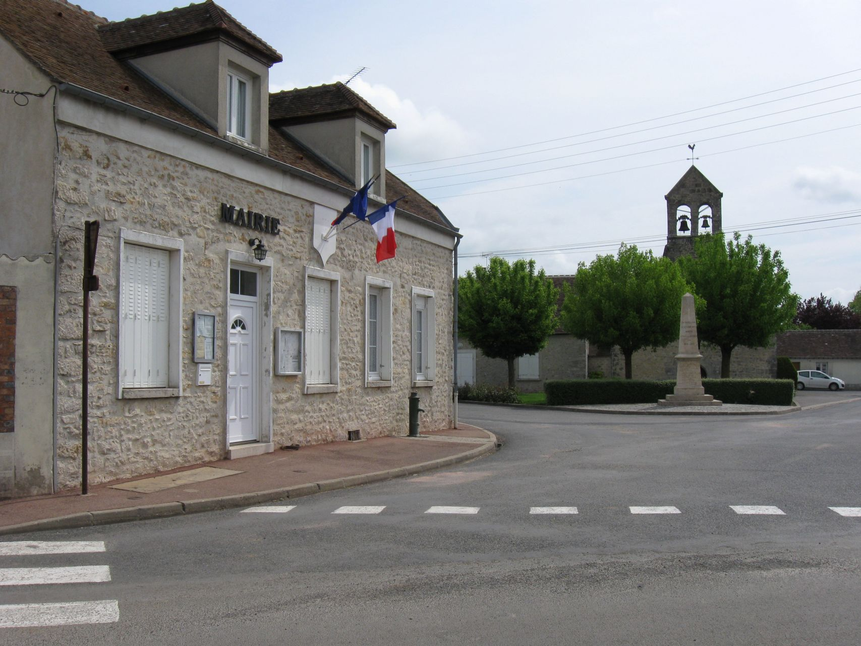 Mairie et place centrale de La Madeleine-sur-Loing (Seine-et-Marne, région Île-de-France)